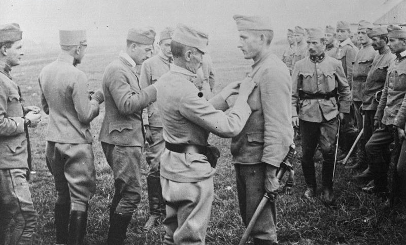 Pułkownik Zygmunt Zieliński dekoruje ułanów z 2 szwadronu ułanów II Brygady Legionów Polskich po słynnej szarży pod Rokitną.